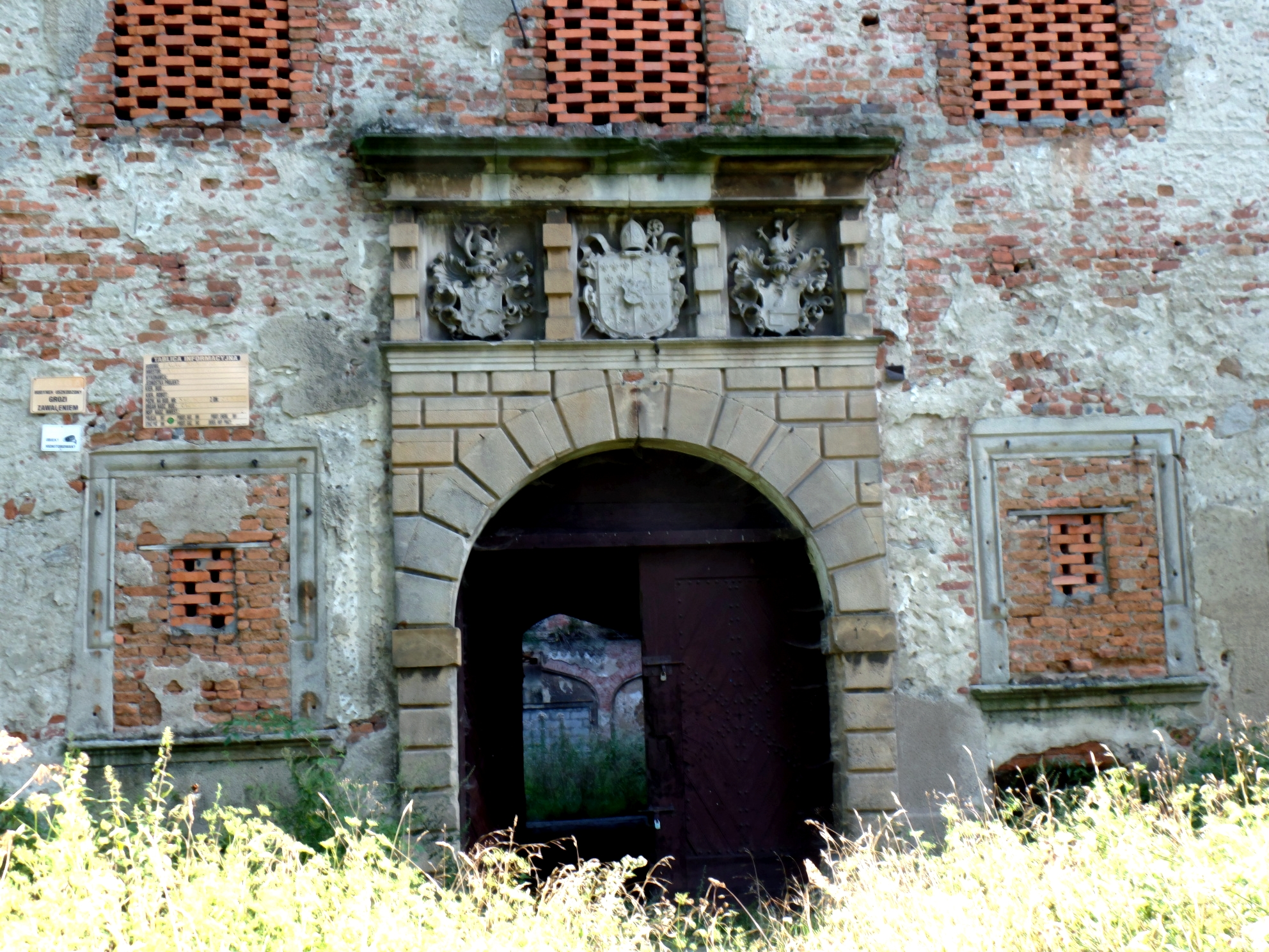 Ruina pałacu w Siestrzechowicach